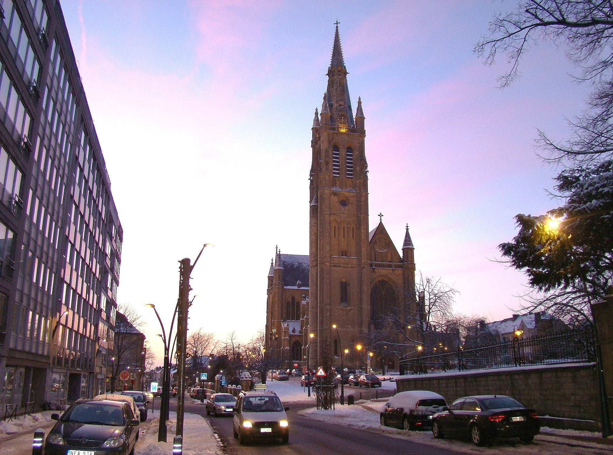 Eglise Saint-Martin